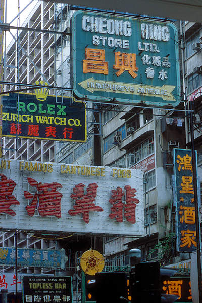 kowloon 1985